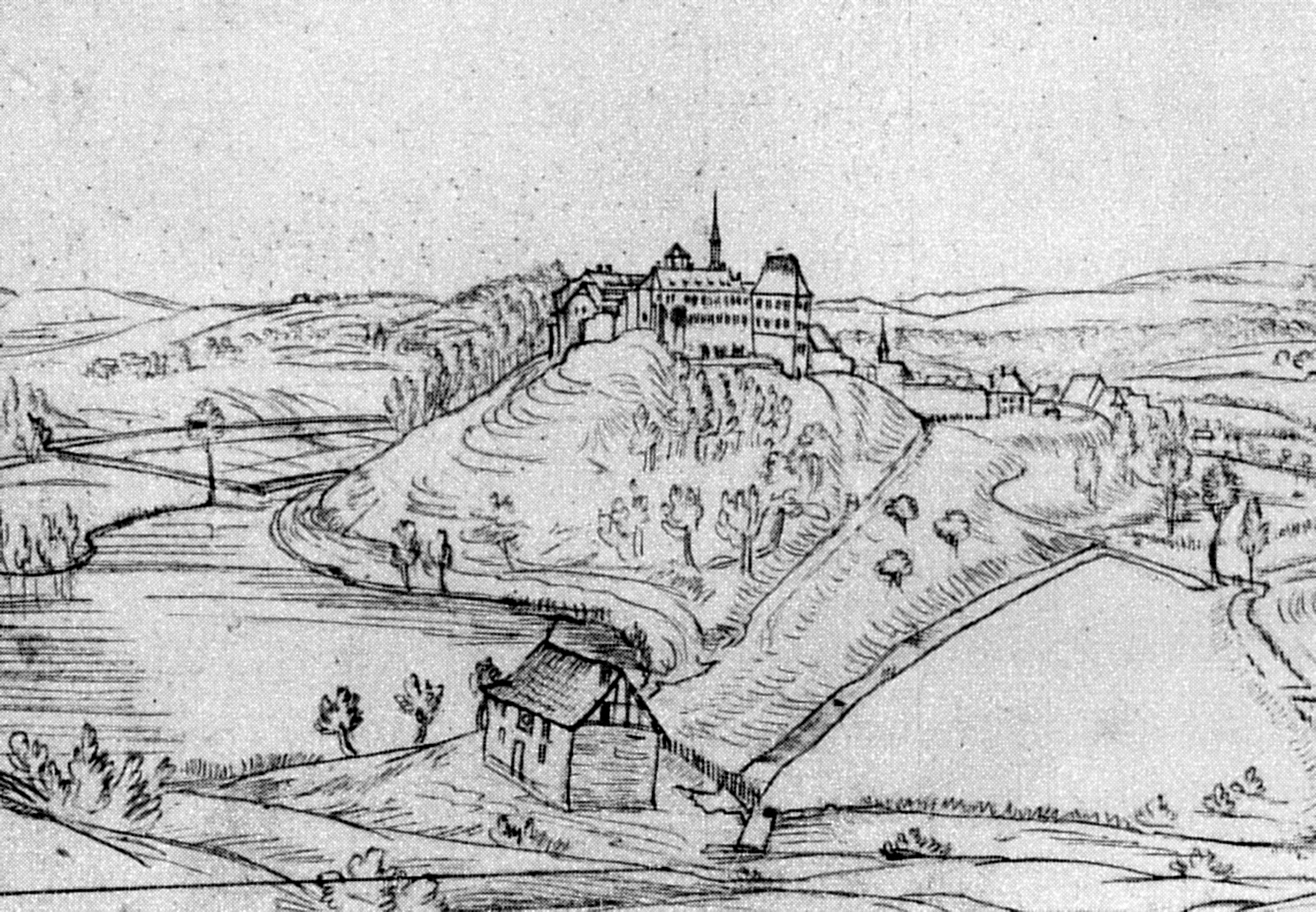 Schloss und Kloster Iburg in Bad Iburg, Ausschnit aus einer Federzeichnung